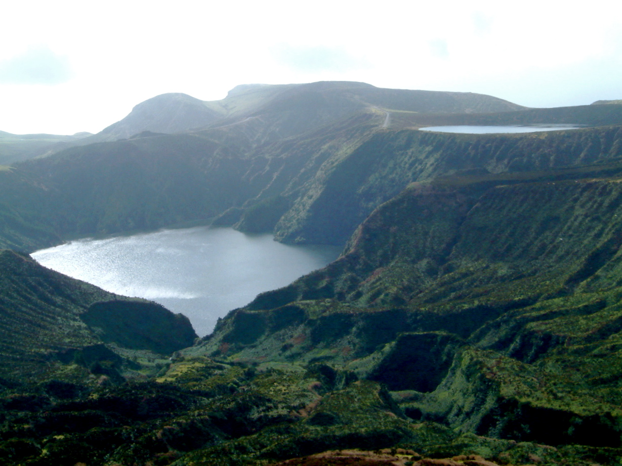 Lagoa Funda & Lagoa Rasa, Island of Flores, Azores